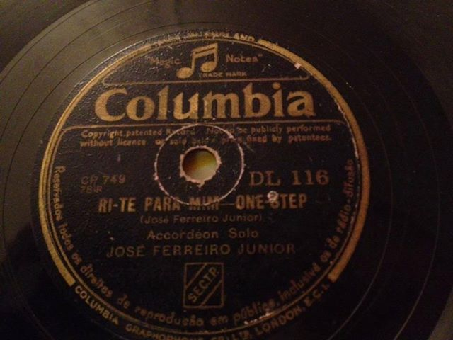 Disco de José Ferreiro Júnior a solo, na Editora Valentim de Carvalho